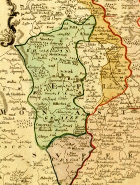 Das ehemalige Hochstift Münster nach der Vertheilung im Jahre 1802 vorgestellt by den Erben Homann 1803 (Kartenausschnitt